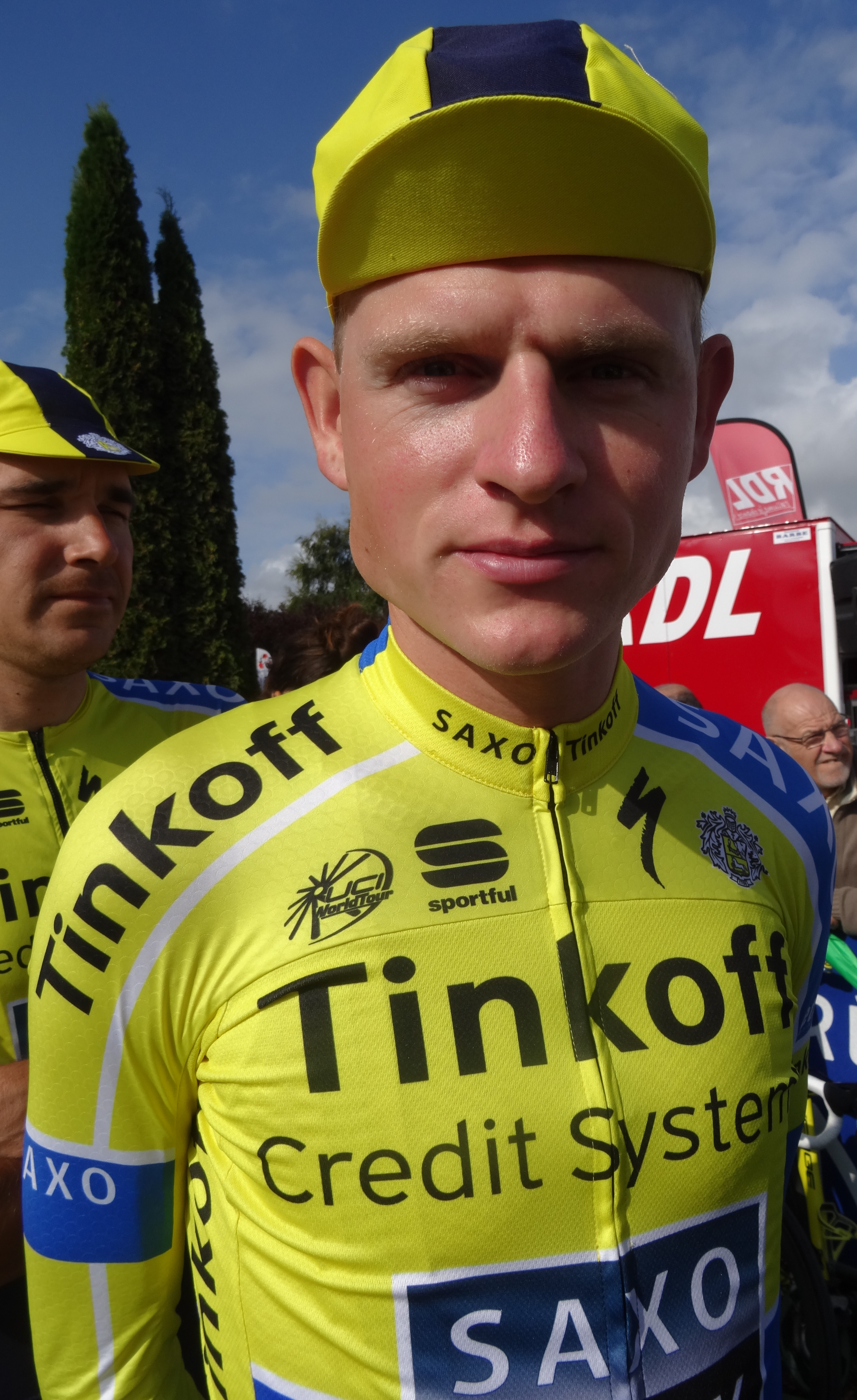 Reportage réalisé le dimanche 21 septembre à l'occasion du départ et de l'arrivée du Grand Prix d'Isbergues 2014 à Isbergues, Nord-Pas-de-Calais, France.